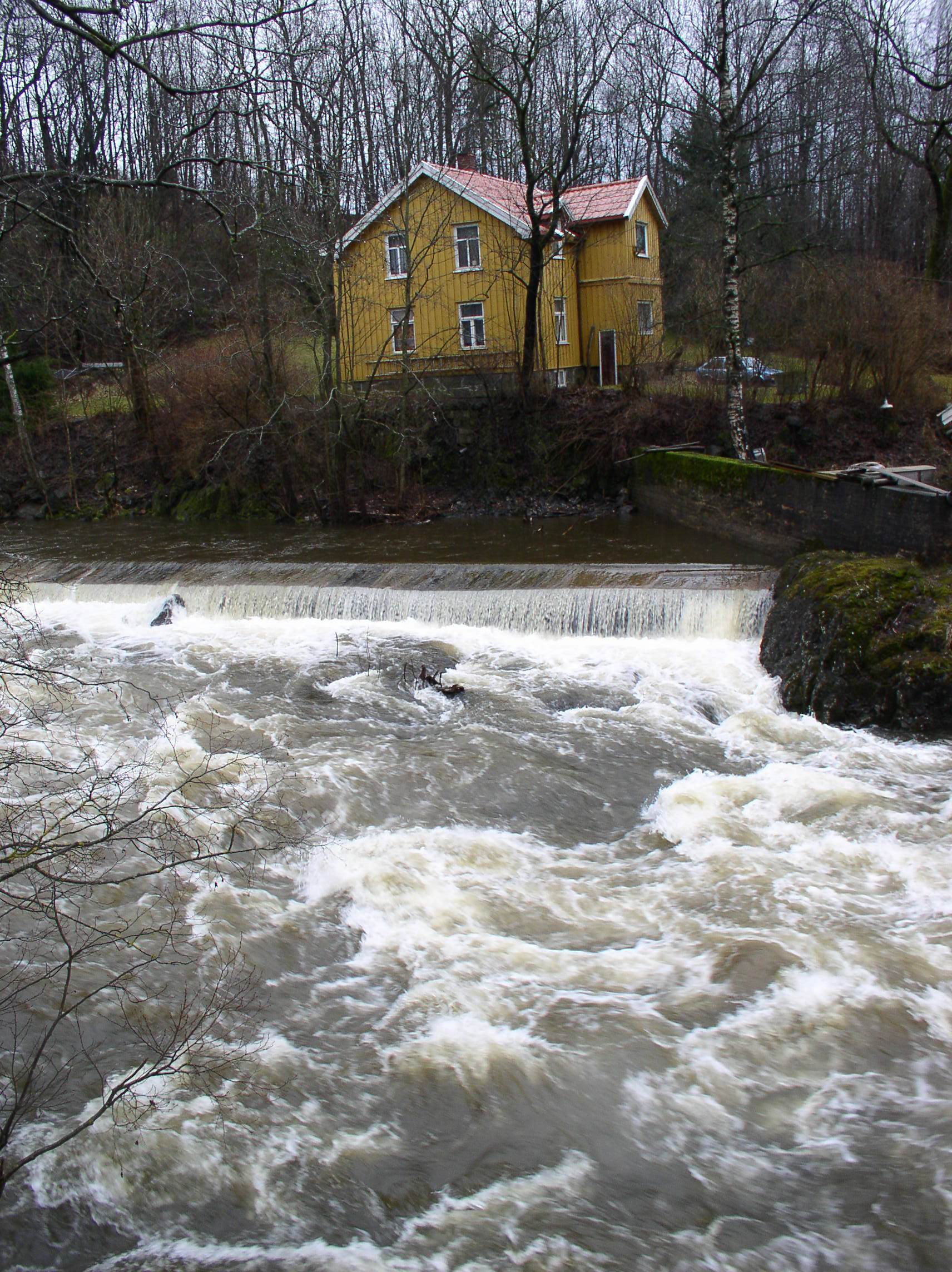 Boligen til Olsen i Bjørnegårdsvingen. I forgrunnen Sandvikselva.